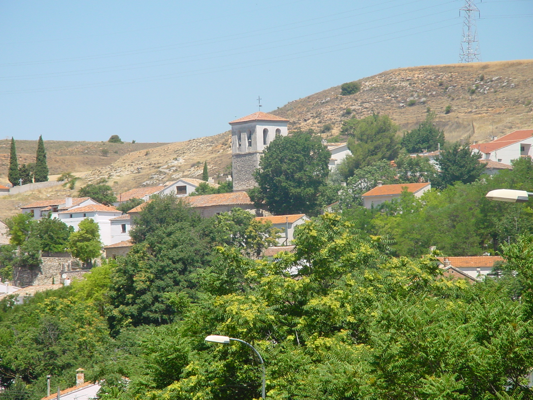 Vista de Olmeda de las Fuentes.